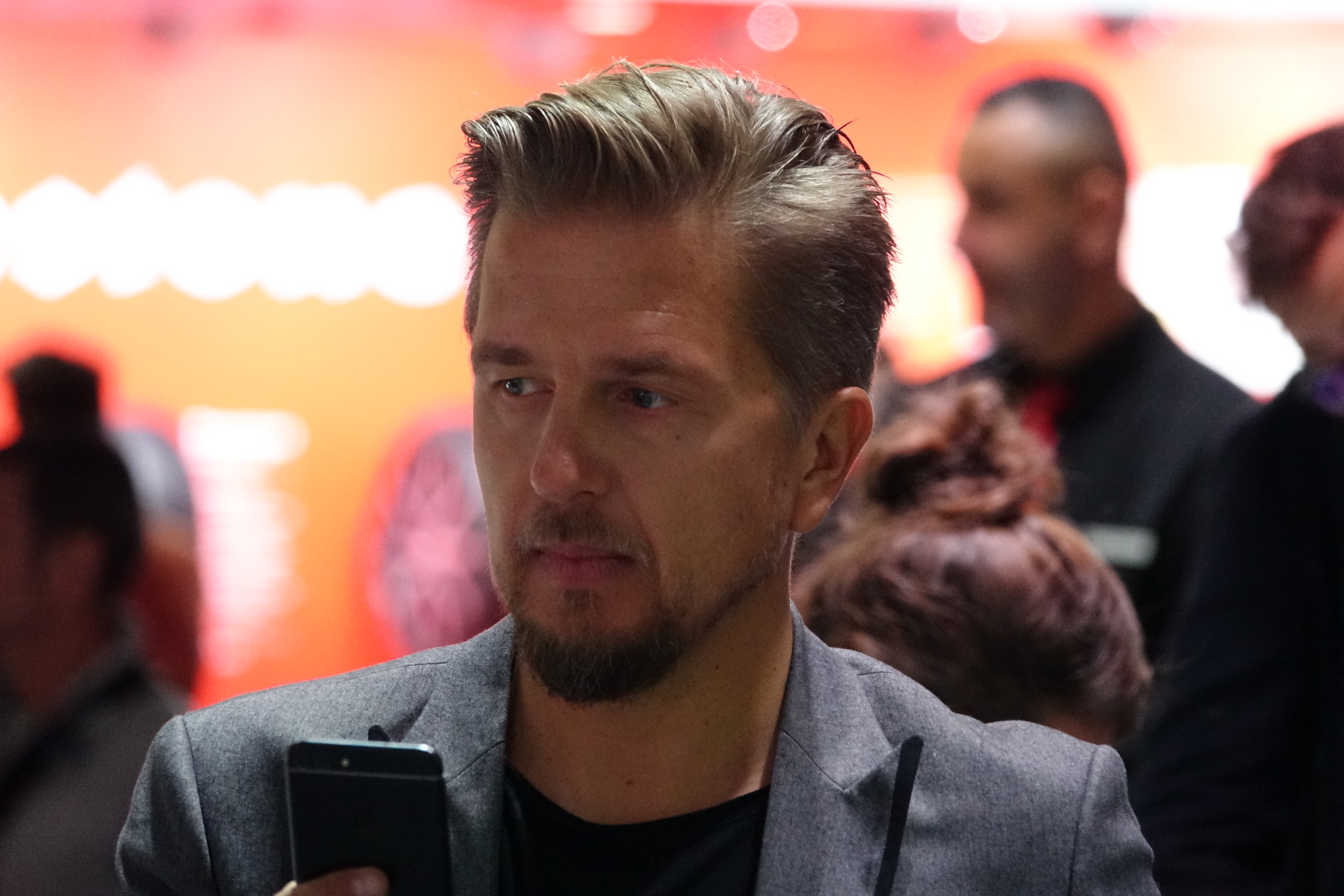 Jean-Pierre Gagick - Mondial de l'Auto 2018